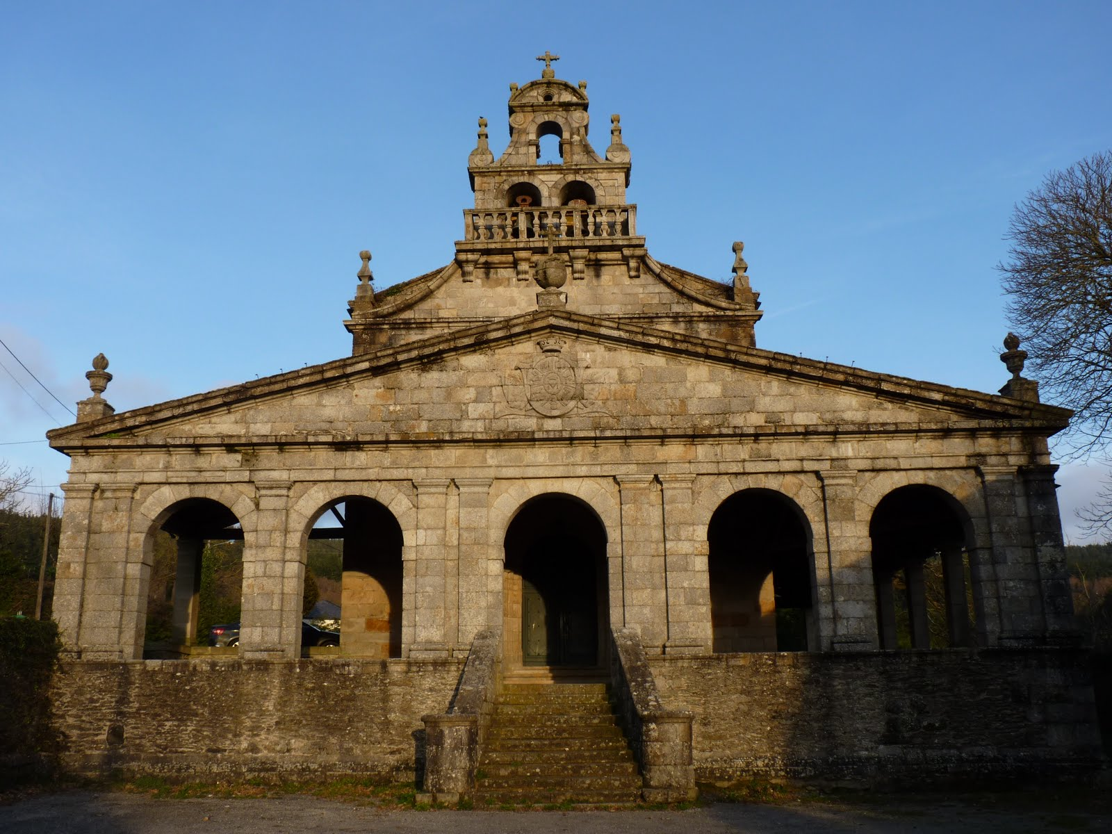 Iglesia de Vilabade